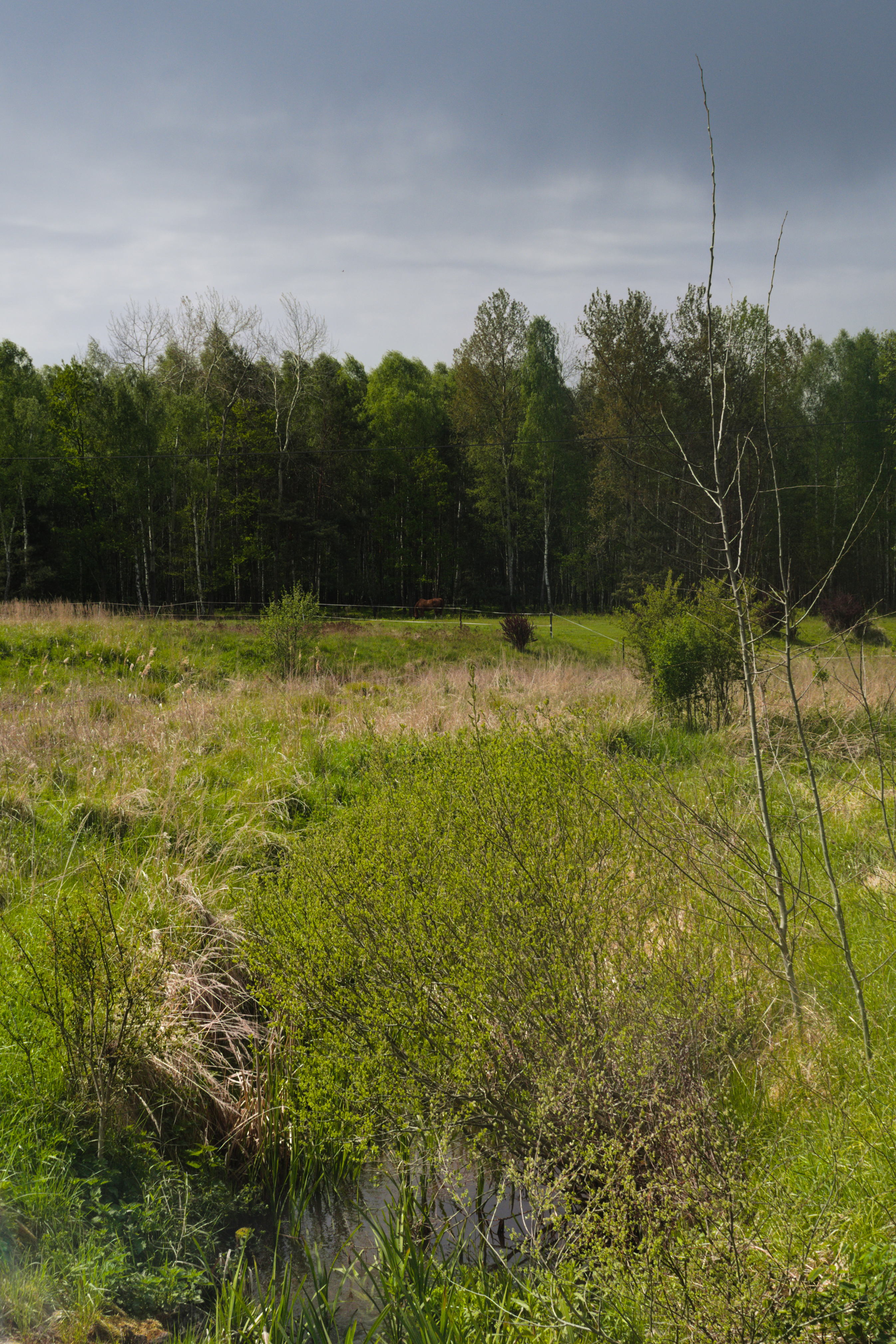 łąka i potok Pniowiec w Tarnowskich Górach przy ul. Chemików (Tłuczykąt), w tle pasący się koń